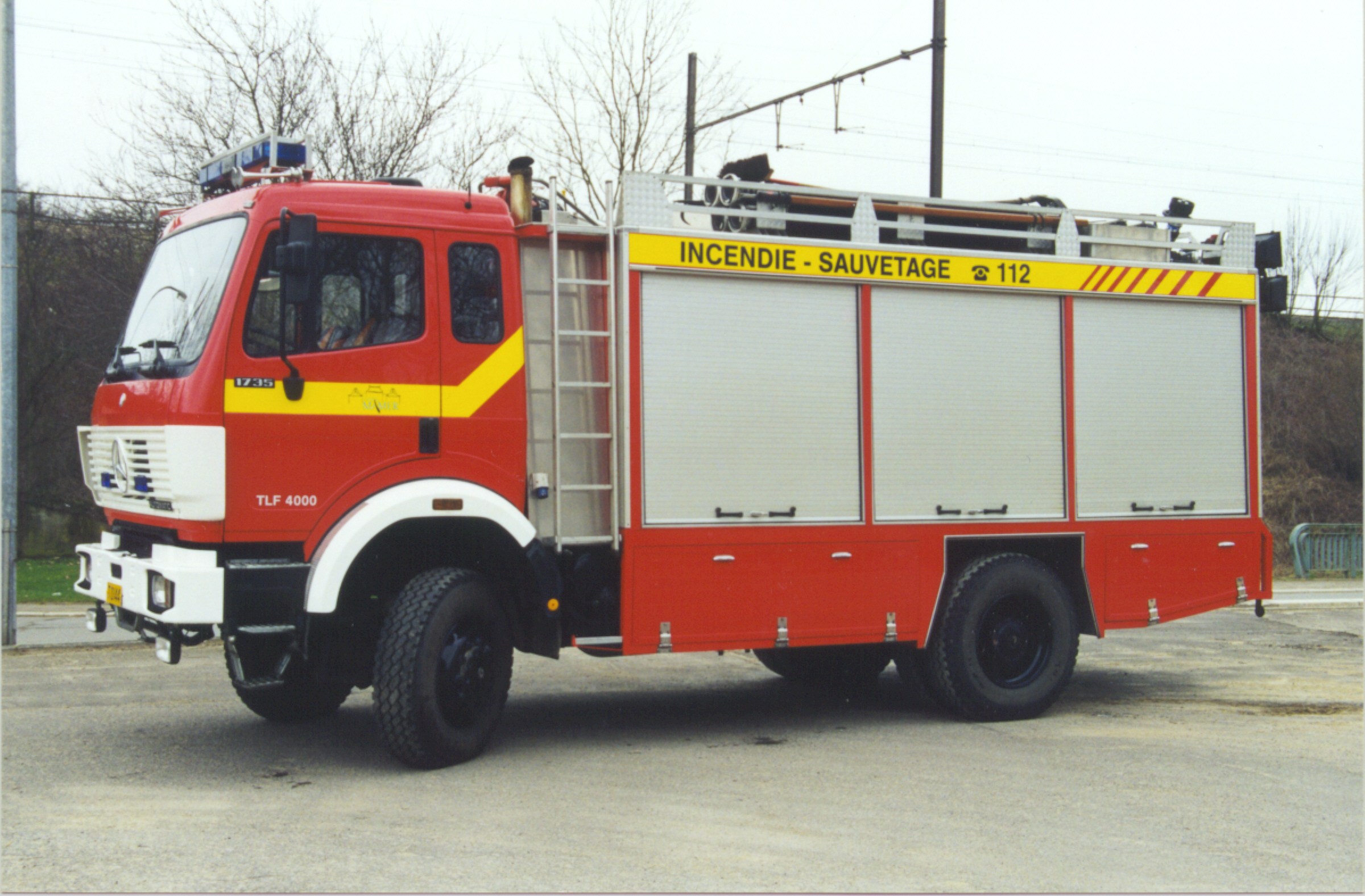 TLF4000